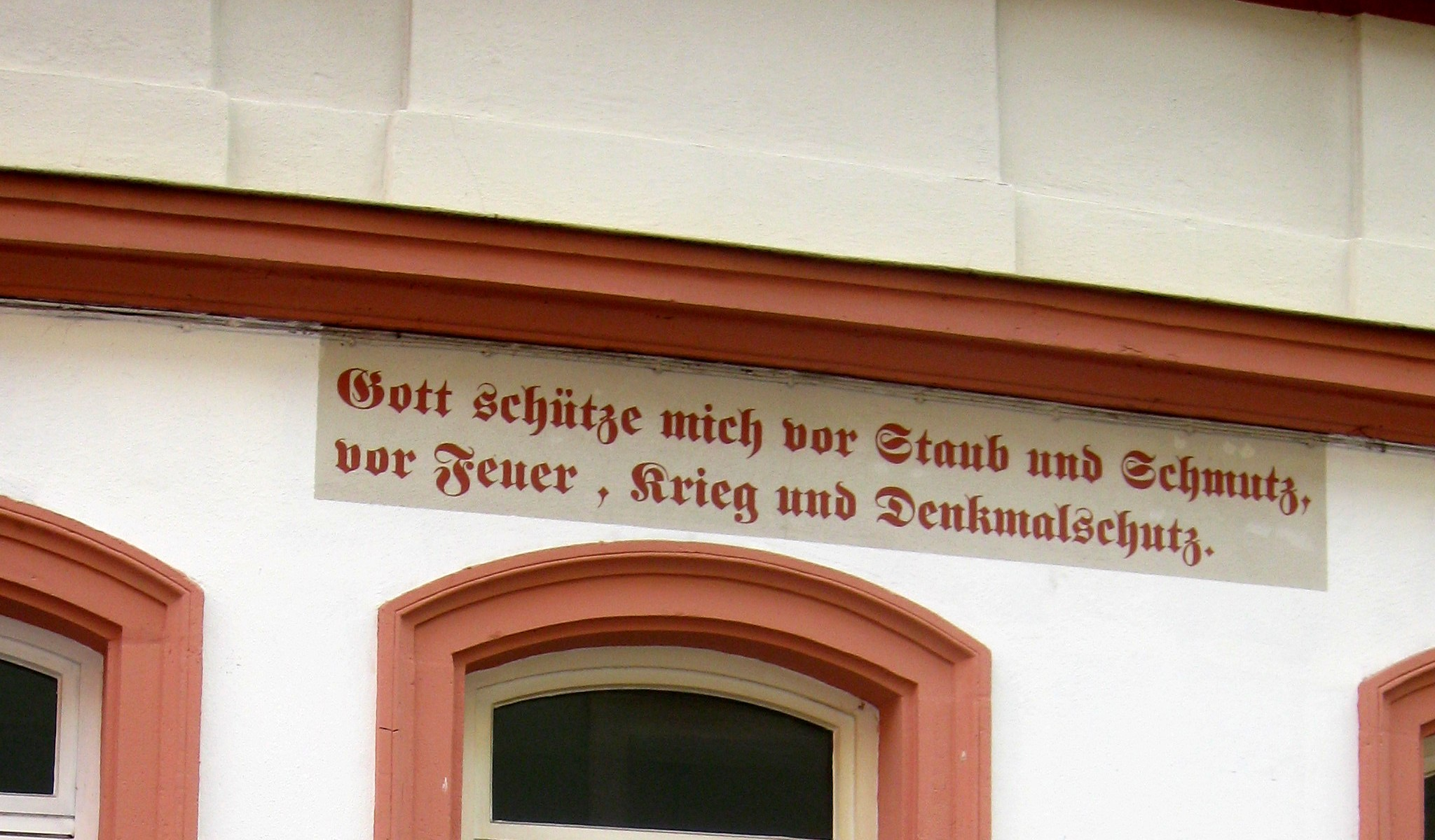 Gott schütze mich vor Denkmalschutz. Fotografiert in Bamberg.